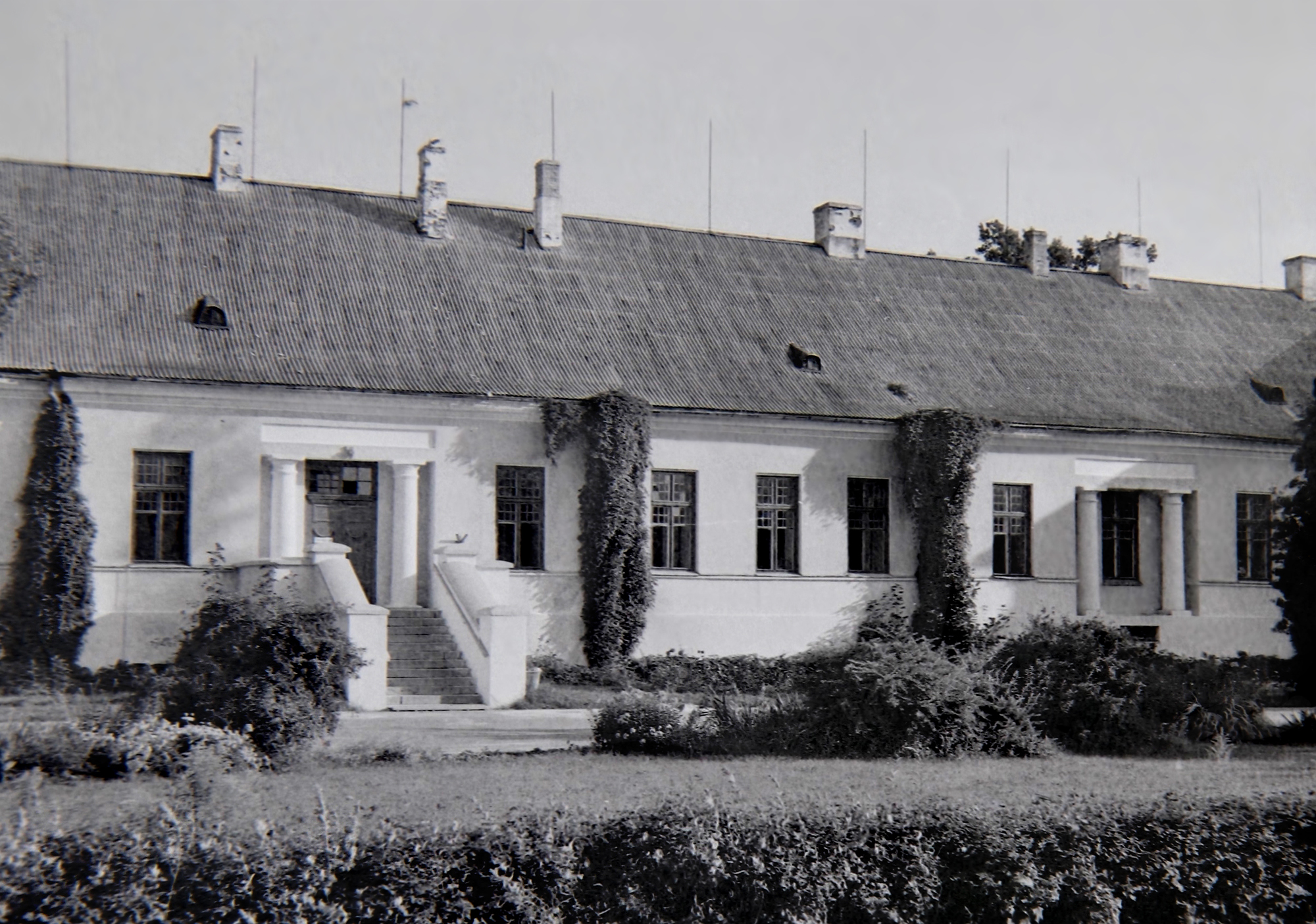 Vana-Antsla mõis